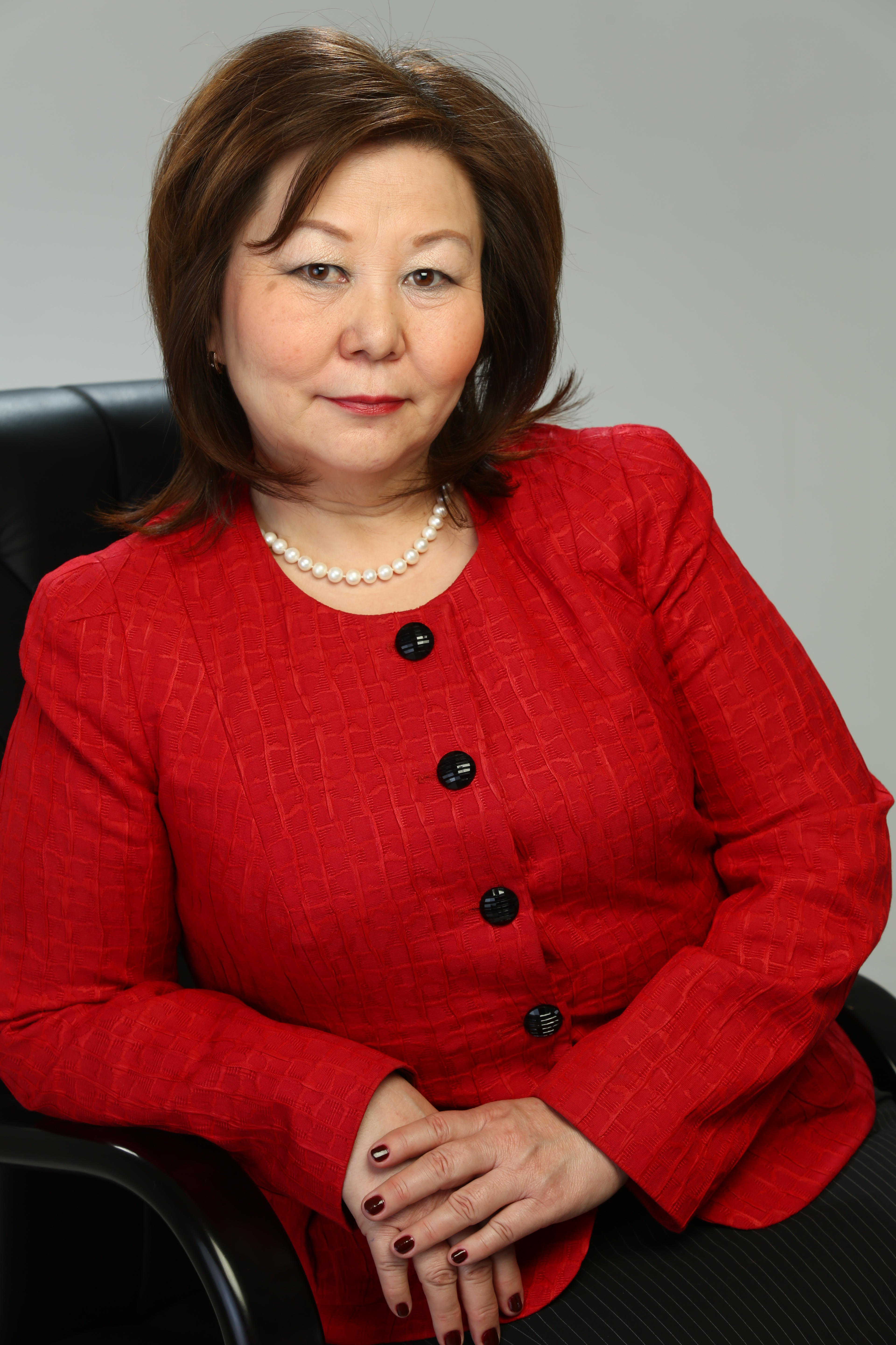 Игнатьева Саргылана Семеновна